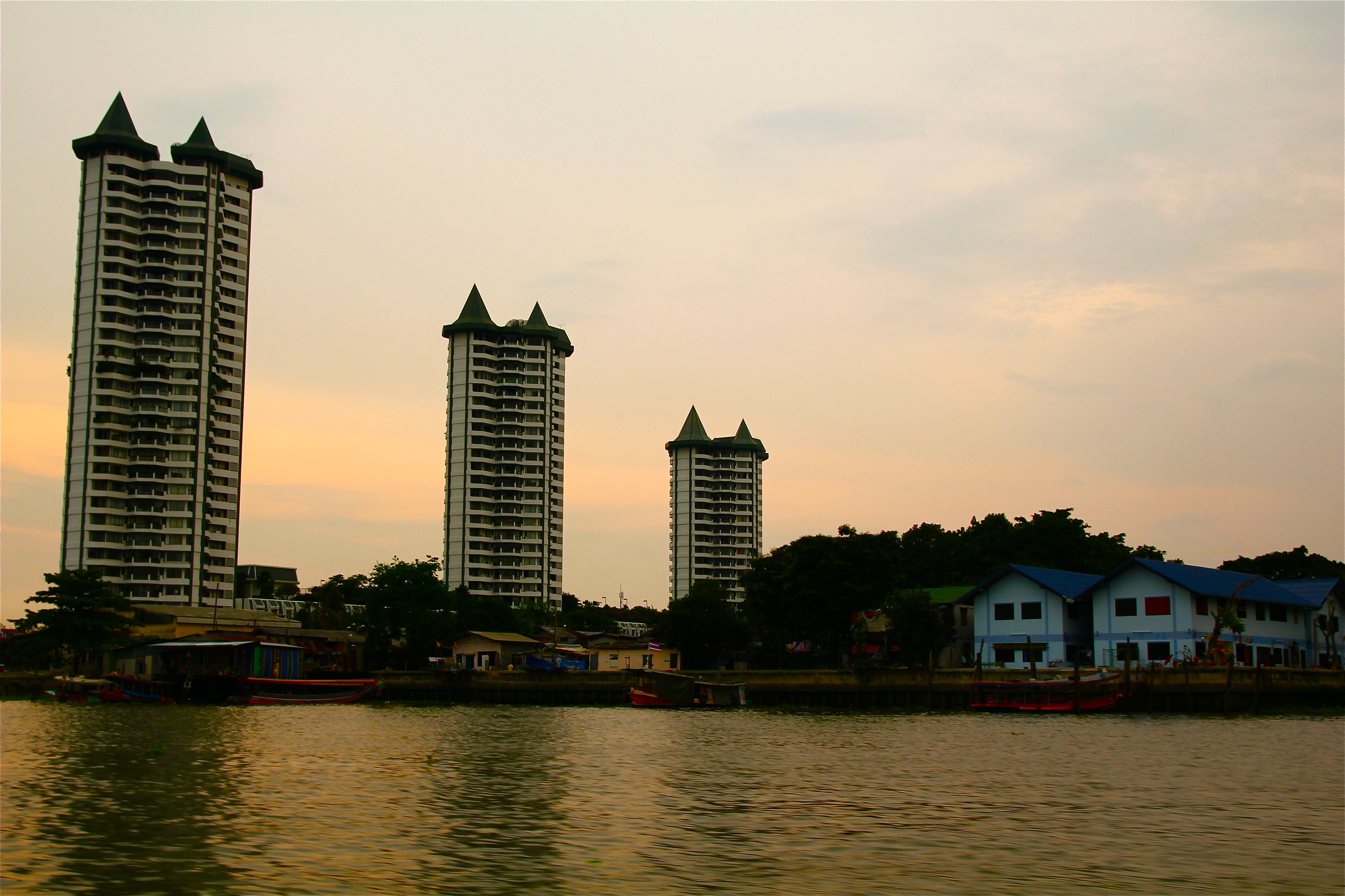 Rivière Chao Phraya